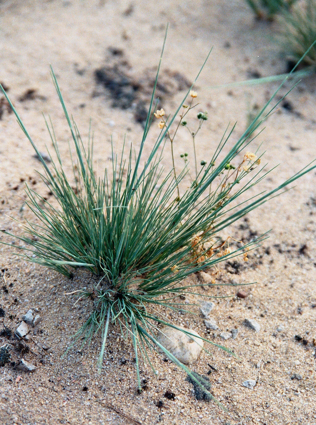 Das Silbergras (Corynephorus canescens) gehört zu den ersten Pflanzen, denen es gelingt, auf den unwirtlichen Offensandflächen der Lieberoser Wüste Fuß zu fassen. Die Lieberoser Wüste befindet sich inmitten der Lieberoser Heide in der Nähe von Lieberose, Landkreis Dahme-Spreewald, Brandenburg, Deutschland. Die rund 5 Quadratkilometer große Panzerwüste ist die größte Wüste Deutschlands. Sie ist durch die militärische Nutzung auf dem ehemaligen sowjetischen (russischen) Truppenübungsplatz Lieberose entstanden. Seit 1999 ist die Wüste Teil des Naturschutzgebietes Lieberoser Endmoräne. (Hinweis: Das Foto entstand während einer fachlich geleiteten Führung.)